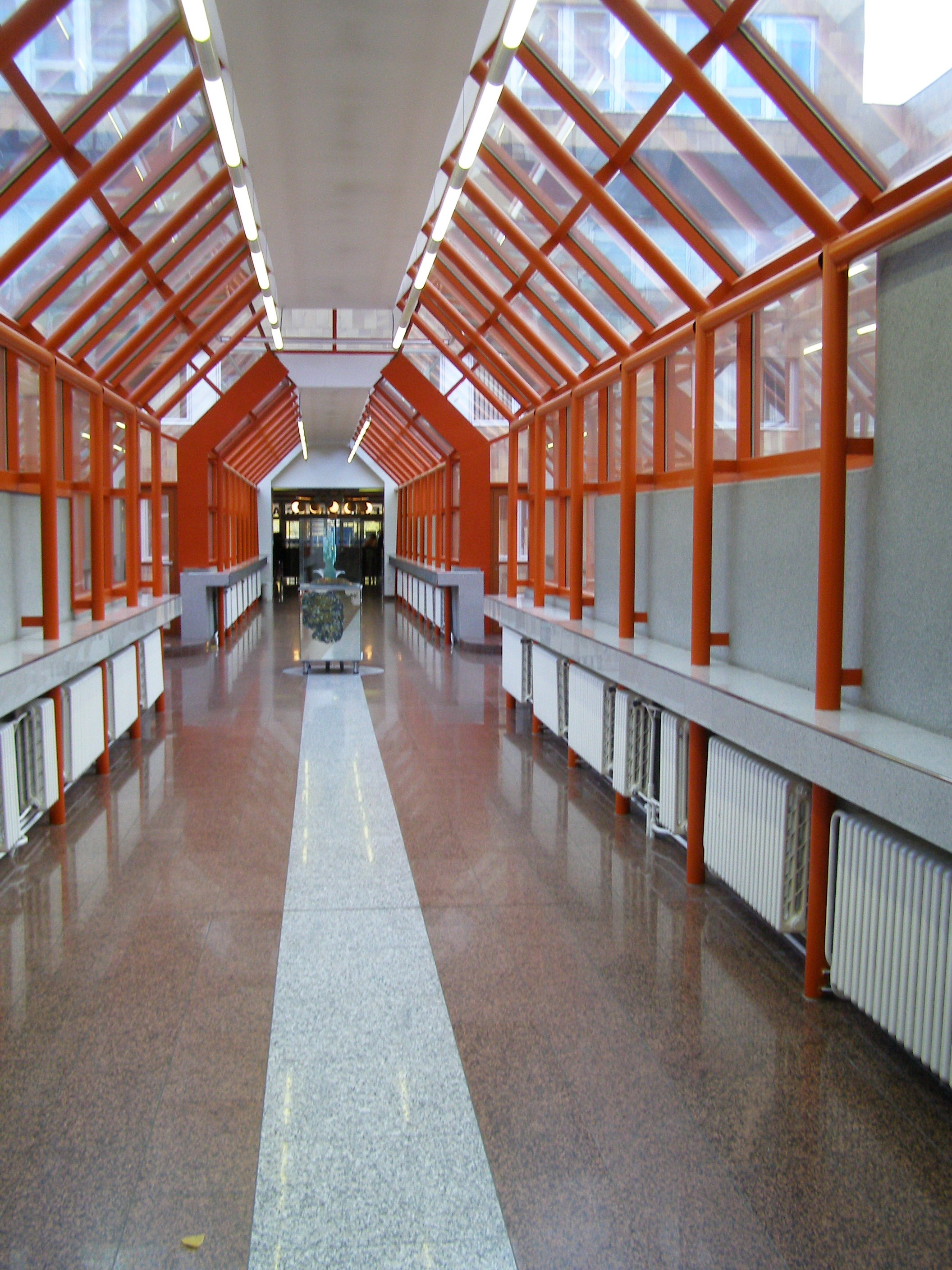 St. Cyril and Method Hospital, Antolská street, Petržalka, Bratislava, Slovakia